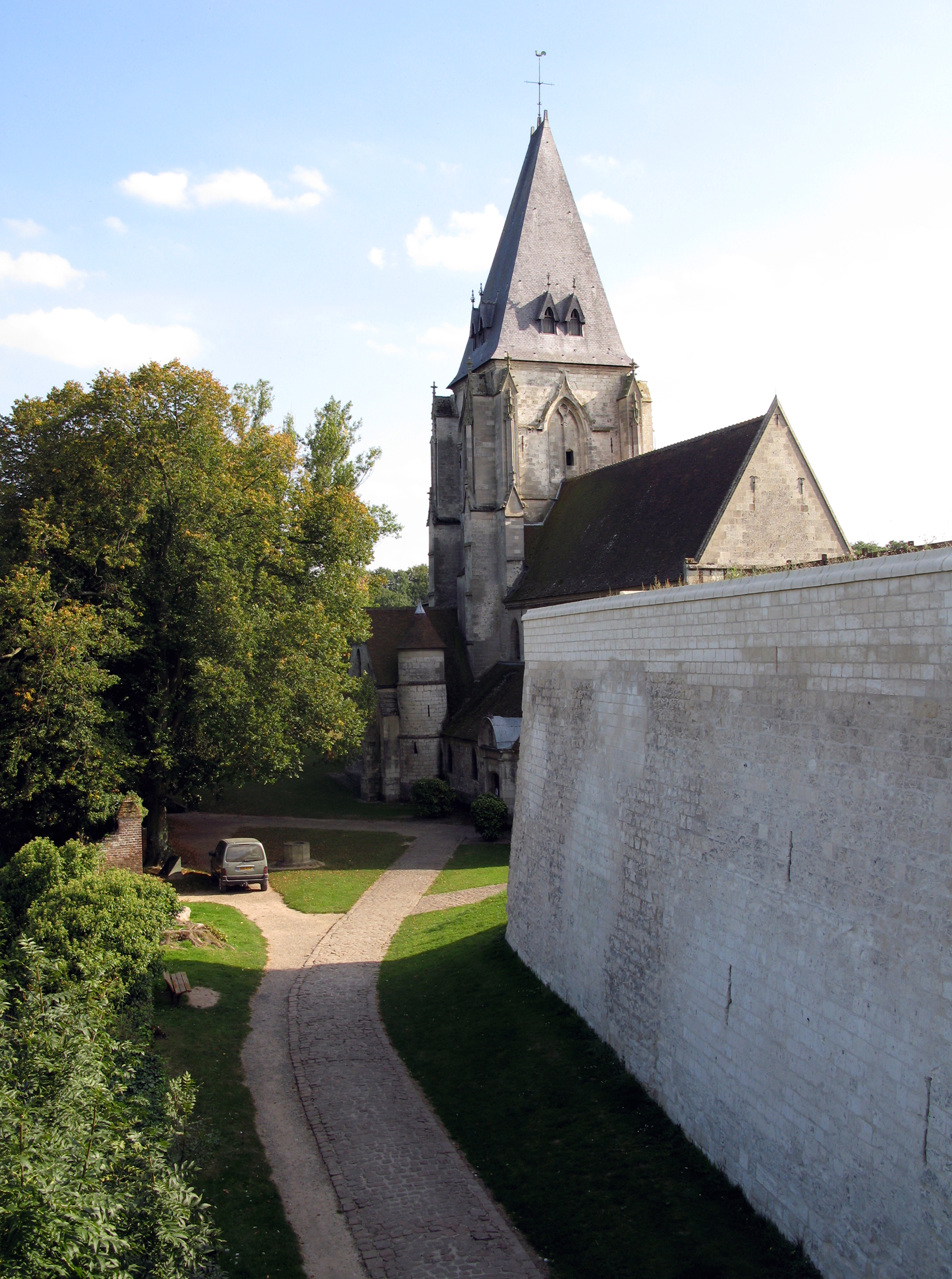 Picquigny (Somme, France) - L'église, derrière le rempart du château, vue depuis le premier étage du Pavillon Sévigné.